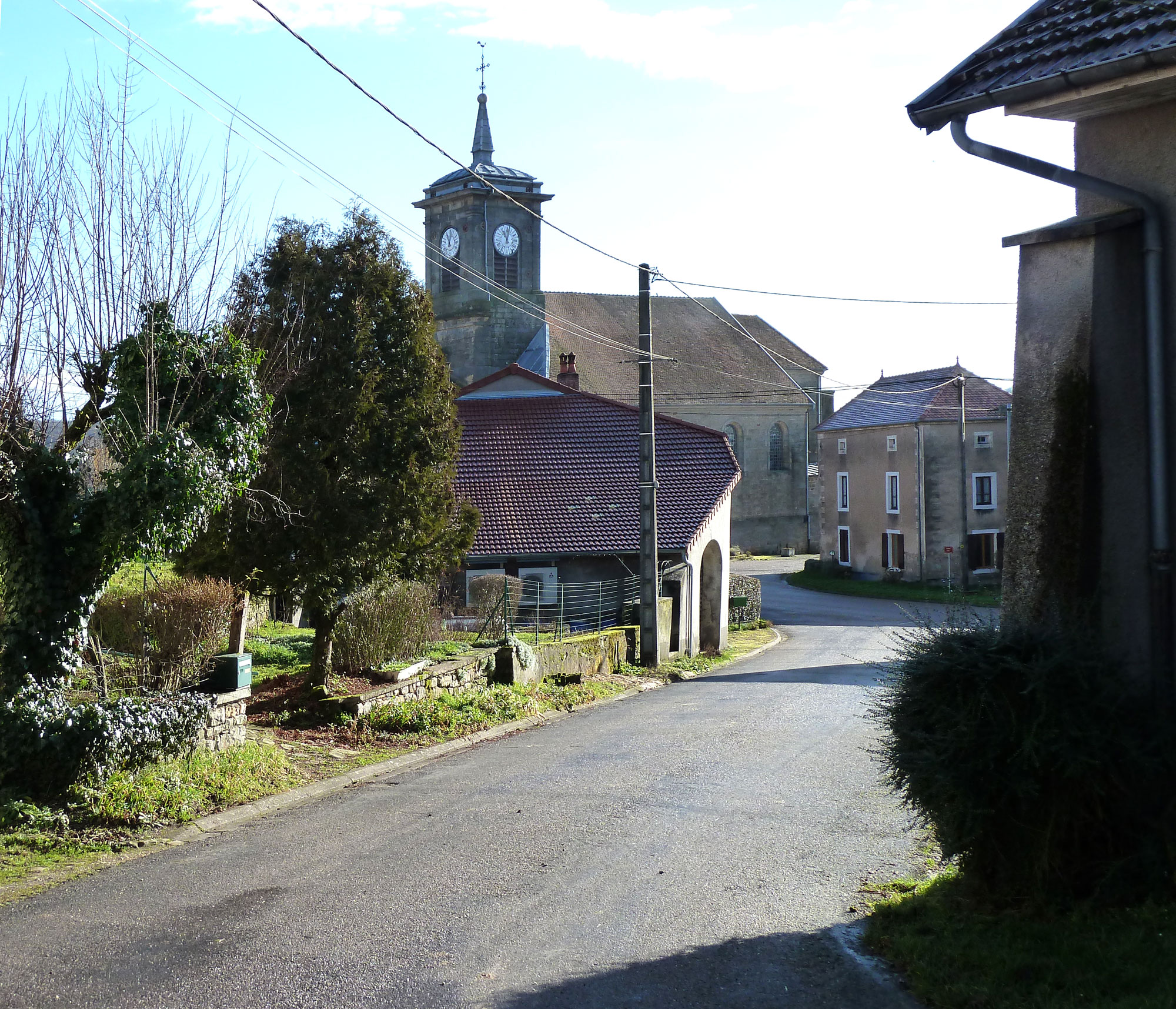 Vue de Magny-lès-Jussey